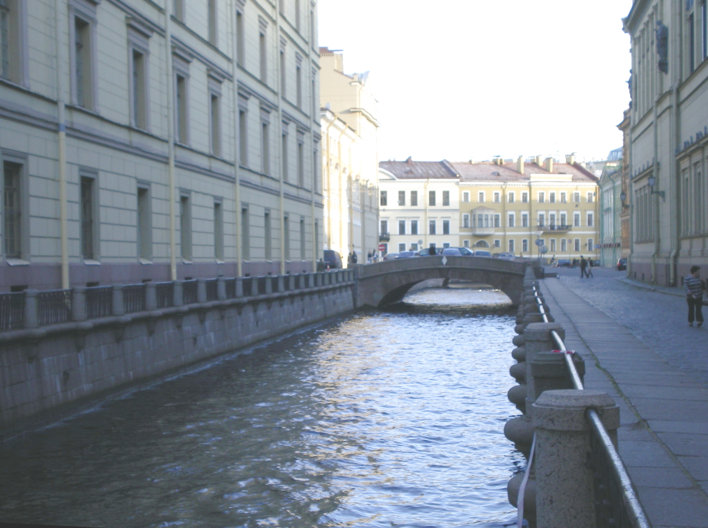 1-й Зимний мост через Зимнюю канавку